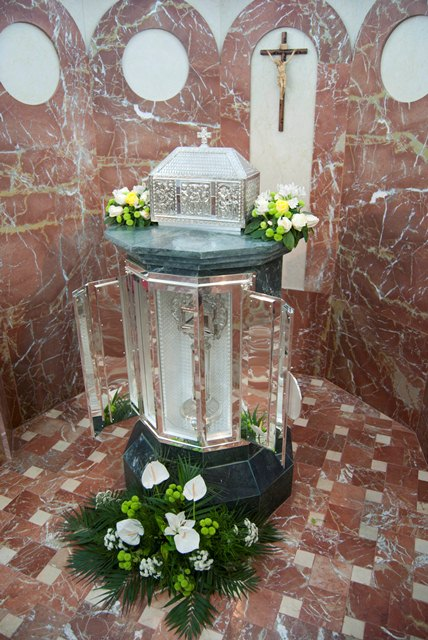 El relicario fue instalado en 2012 en el Oratorio construido con ocasión del nombramiento de san Juan de Ávila como Doctor de la Iglesia. Está situado anexo a la Cueva de las penitencias.